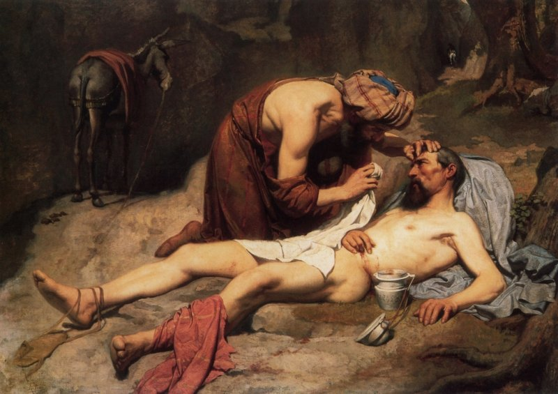 Teofilo Patini - Buon samaritano olio su tela - 1859 119 x 158 cm Banca Popolare Adriatico, Pesaro